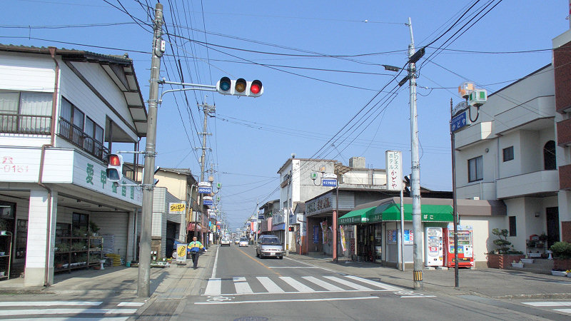 くま川鉄道湯前線ja:免田駅 駅周辺 駅前を走るja:国道219号を北東方向に見る。あさぎり町免田東交差点から撮影。 撮影者/著者/著作権保有者 : MK Products (本人がアップロード) 撮影日 : 2007/03/22 免田駅用にアップロードした画像です。良い画像があれば別の画像に変えてください。